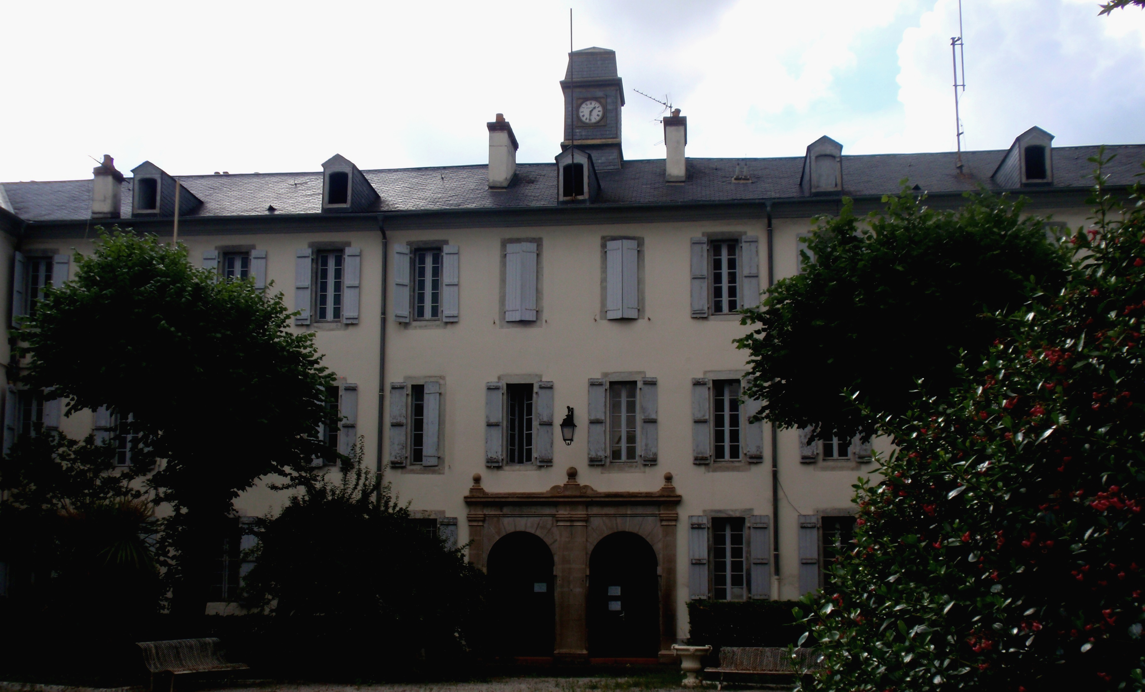 Ancien séminaire de Tarbes, XVIII ème siècle